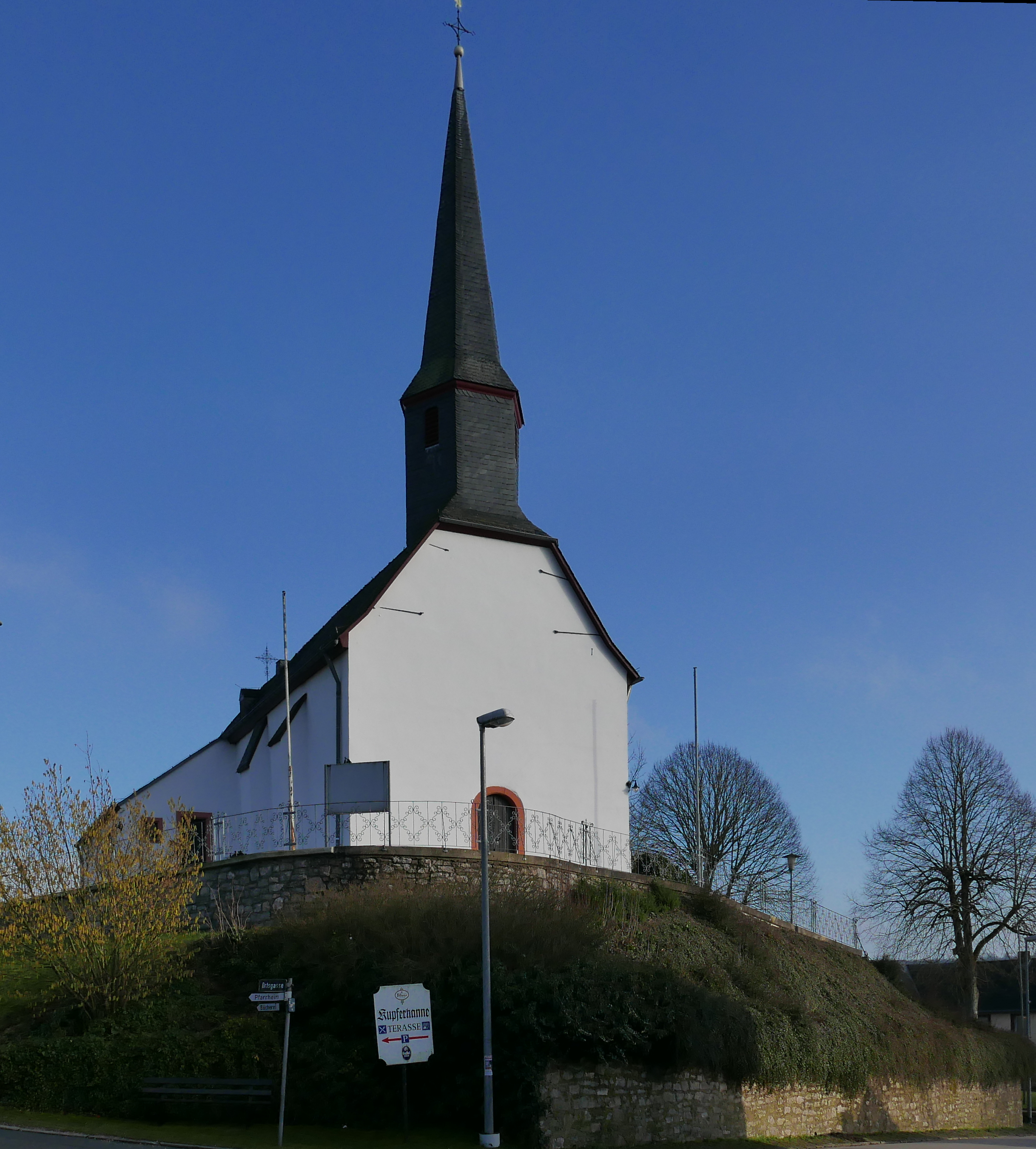 Mülheim, Ortsgasse 2; kath. Pfarrkirche 9, von W